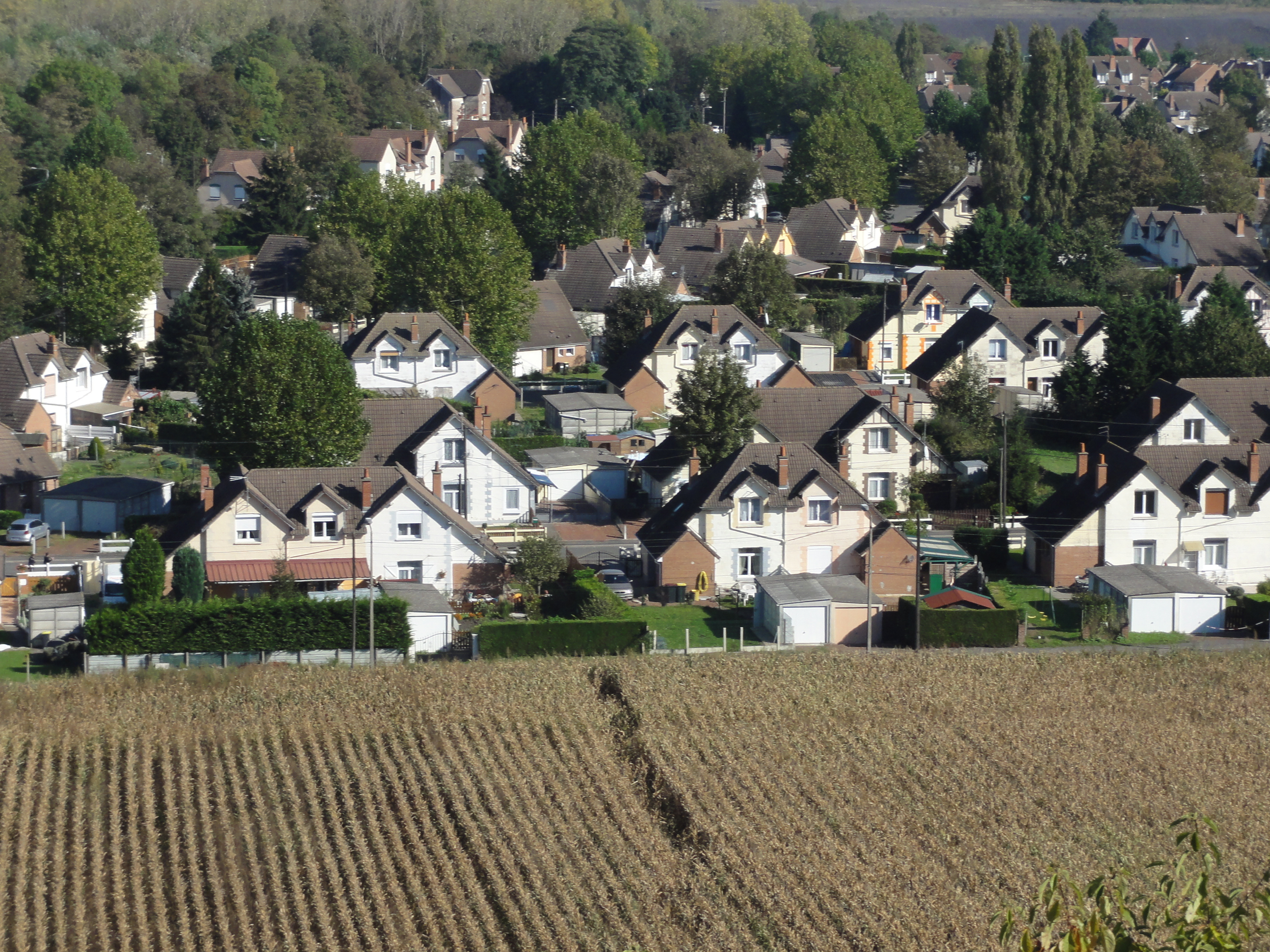 Cités de la Fosse n° 6 bis de la Compagnie des mines de Dourges, Hénin-Beaumont, Pas-de-Calais, Nord-Pas-de-Calais, France.